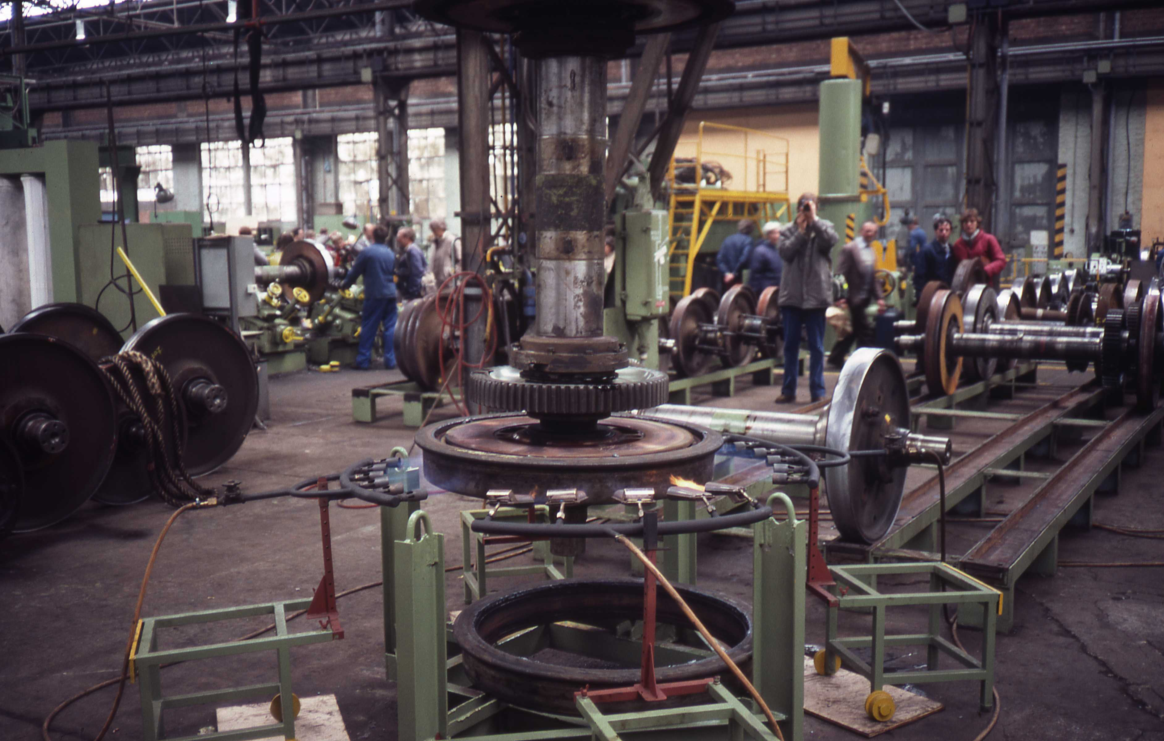 Open deur dag in de werkplaats Mechelen ter gelegenheid van 150 jaar spoorwegen. Hier de werkplaats waar de spoorwiel banden worden verwijderd en geplaatst. Door verhitting gaat de metalen band expanderen en daarna wegvallen.